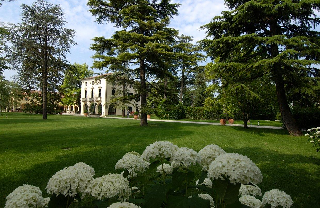 Vista diurna Villa Borromeo Padova dal parco